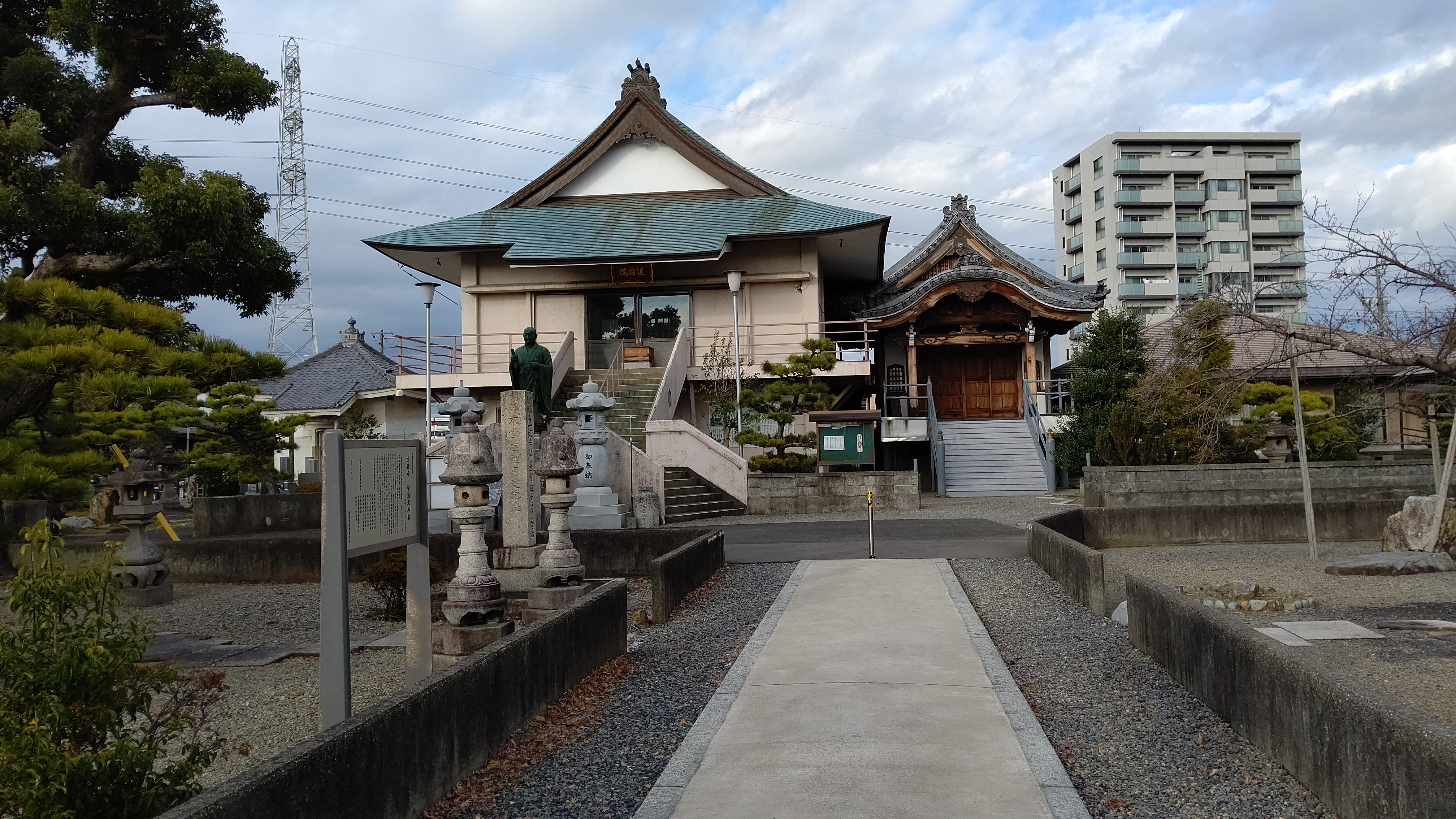 二条師良の号で菩提所「是心院」があった立政寺（岐阜県）